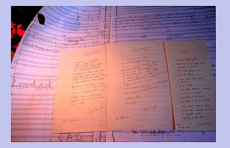 Pages de Songs from Esstal, avec poêmes.